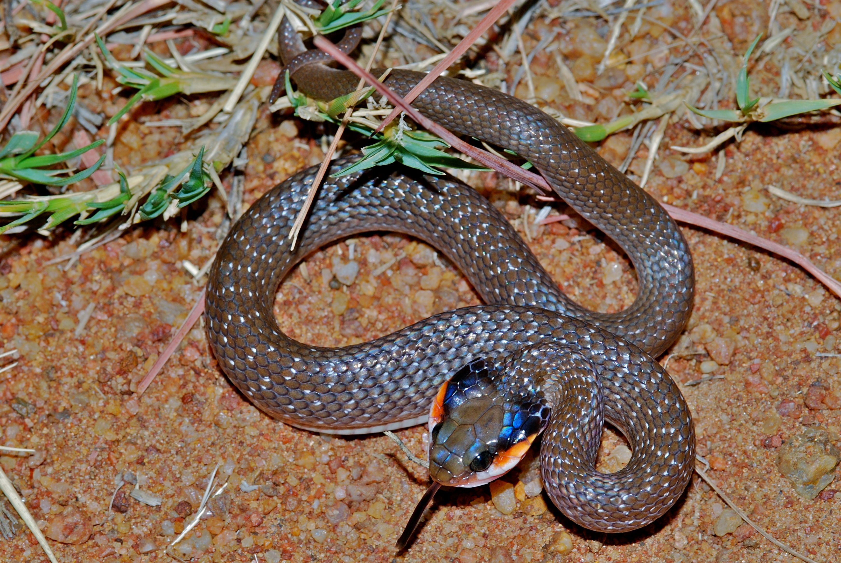 Manyane Resort, Pilanesberg, SOUTH AFRICA